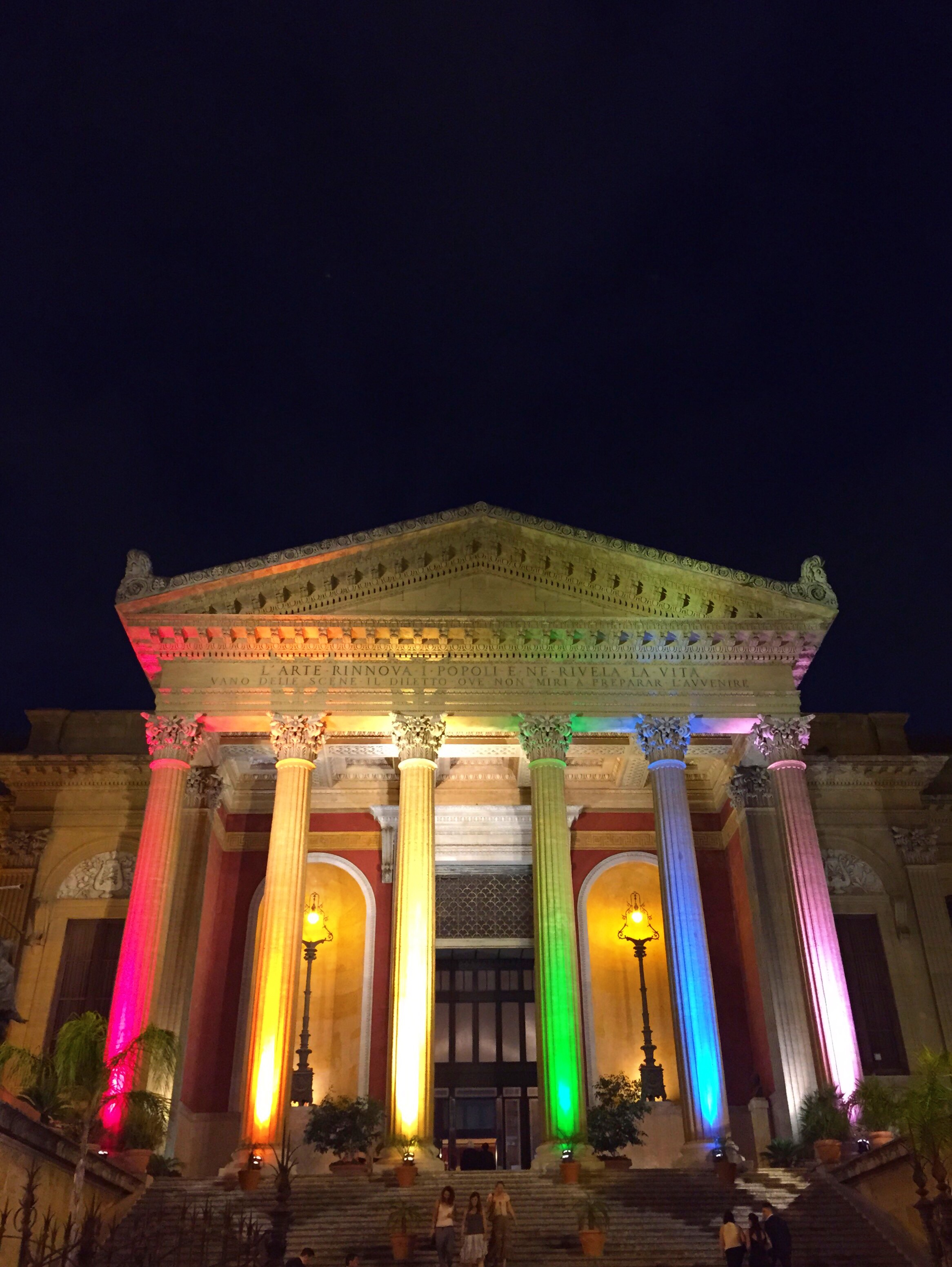 Il teatro Massimo di Palermo illuminato per il Gay Pride del 2015